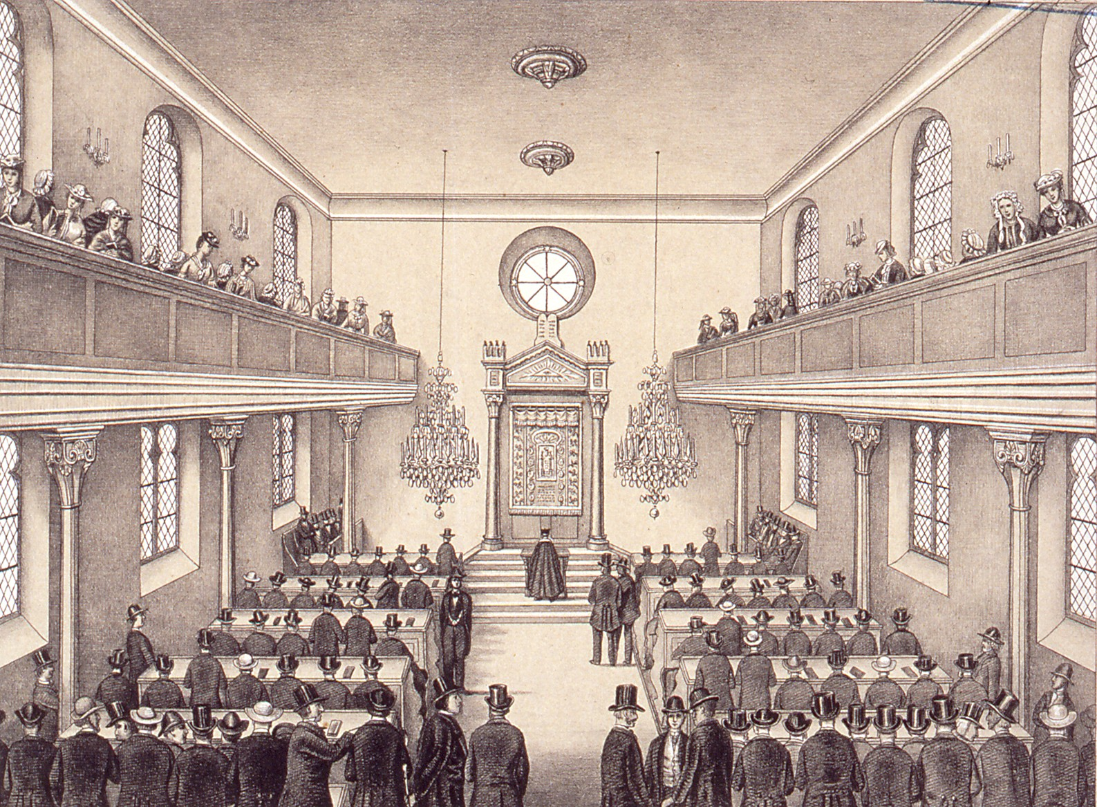 Gerstheim intérieur de la synagogue. lithogr. A. Netter 1874.